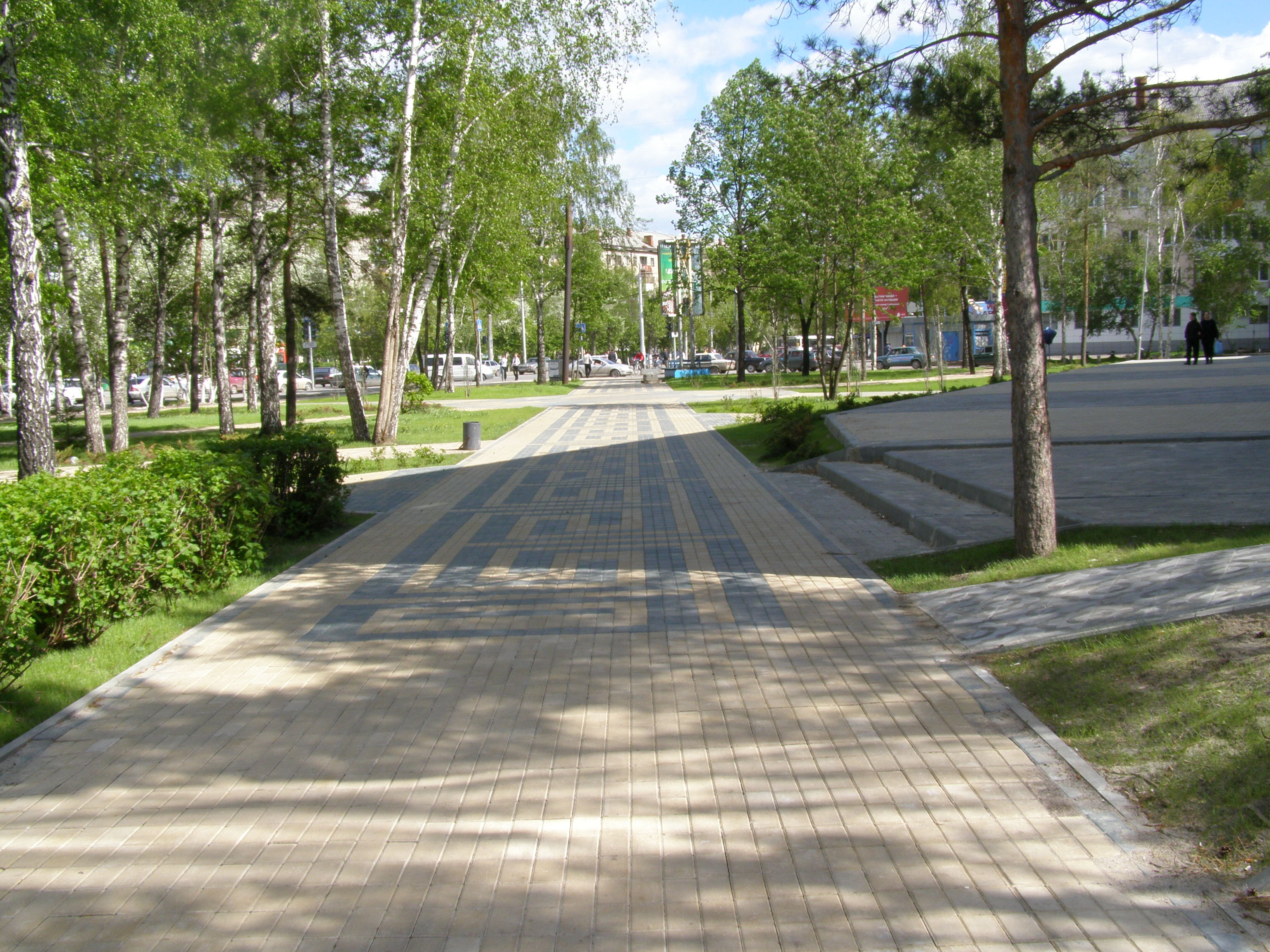 Skvaro Tenistinij (Ombra). Tjumeno, Rusio.